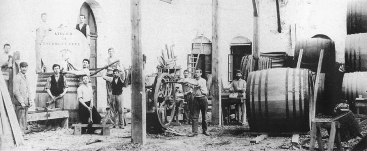 1890s. Winemaking barrel shop in Zikhron Yaakov